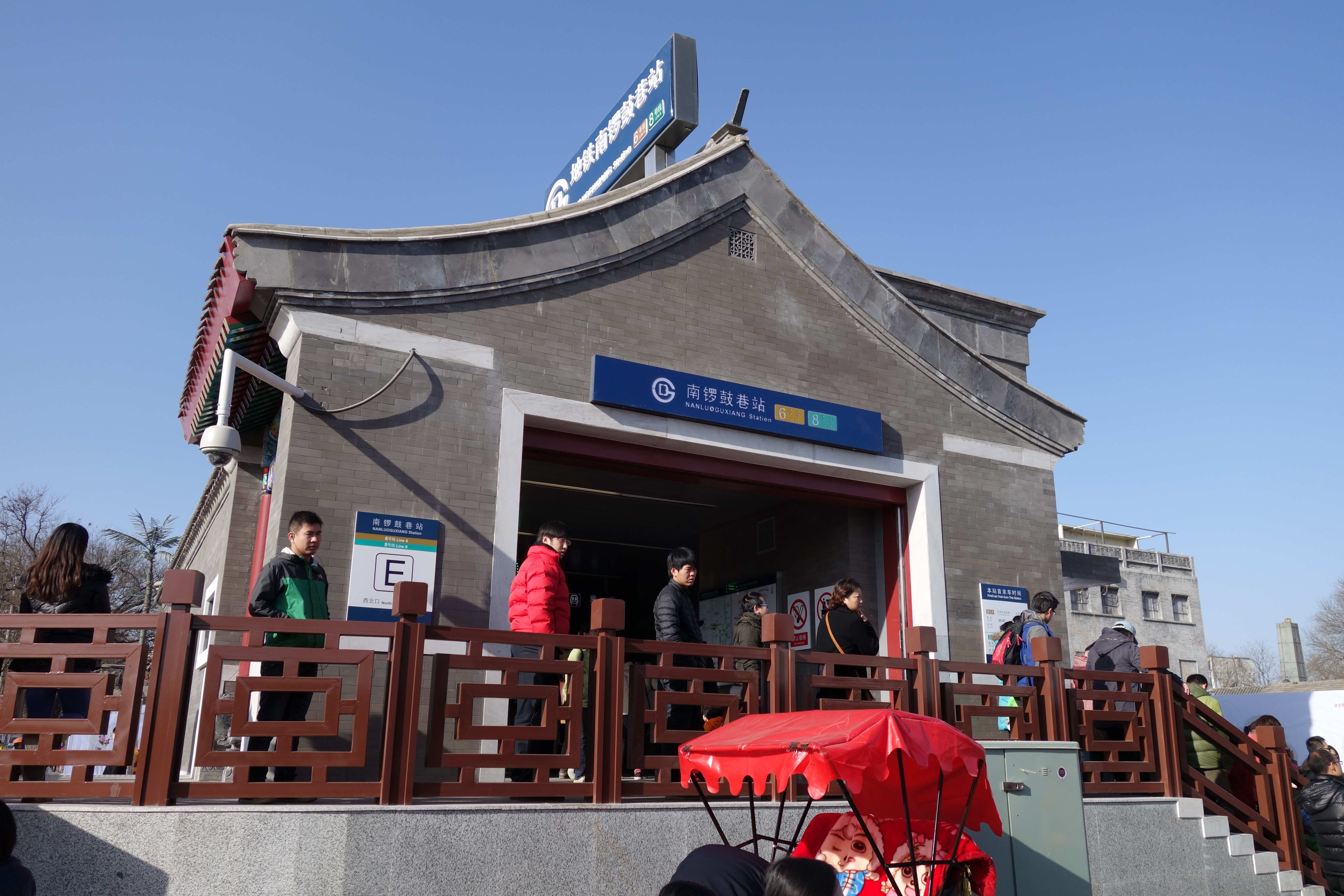 南锣鼓巷站E口